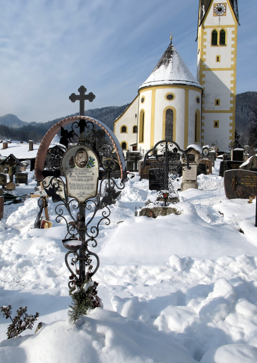 Schliersee, Friedhof Kirche St. Martin: Grab des Wildschützen Jennerwein